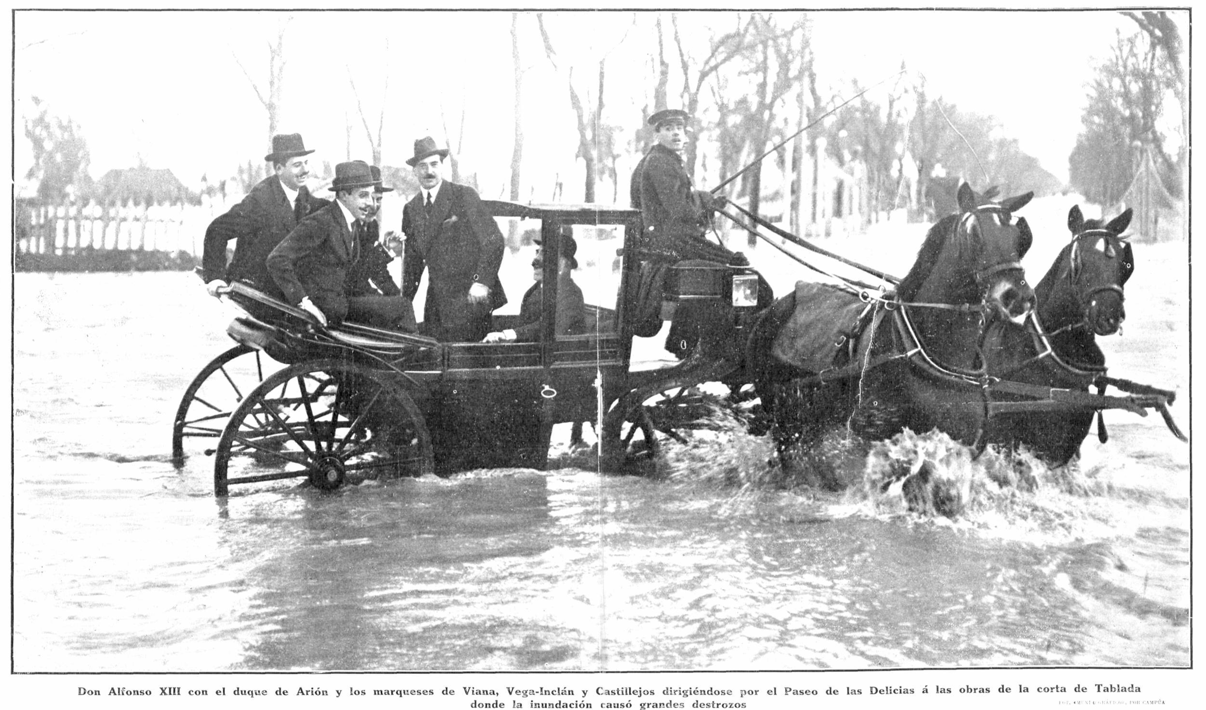 Don Alfonso XIII con el duque de Arión y los marqueses de Viana, Vega-Inclán y Castillejos dirigiéndose por el Paseo de las Delicias á las obras de la corta de Tablada donde la inundación causó grandes destrozos..